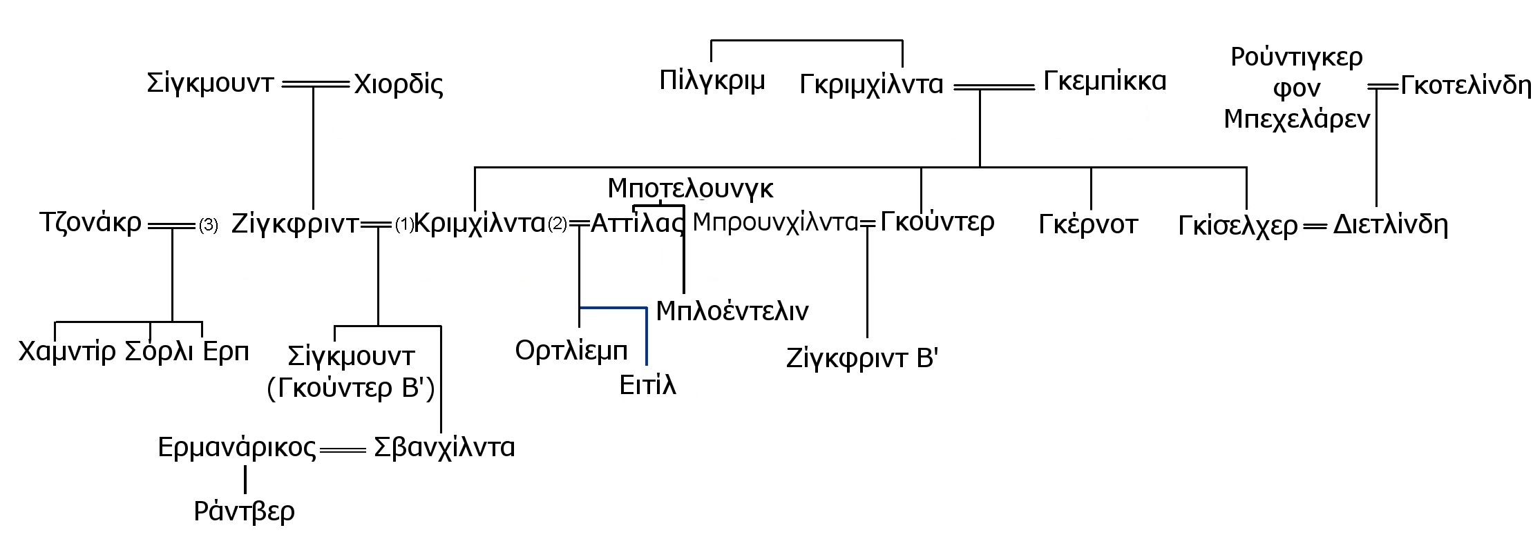 Η γενεαλογία των Νιμπελούνγκεν.